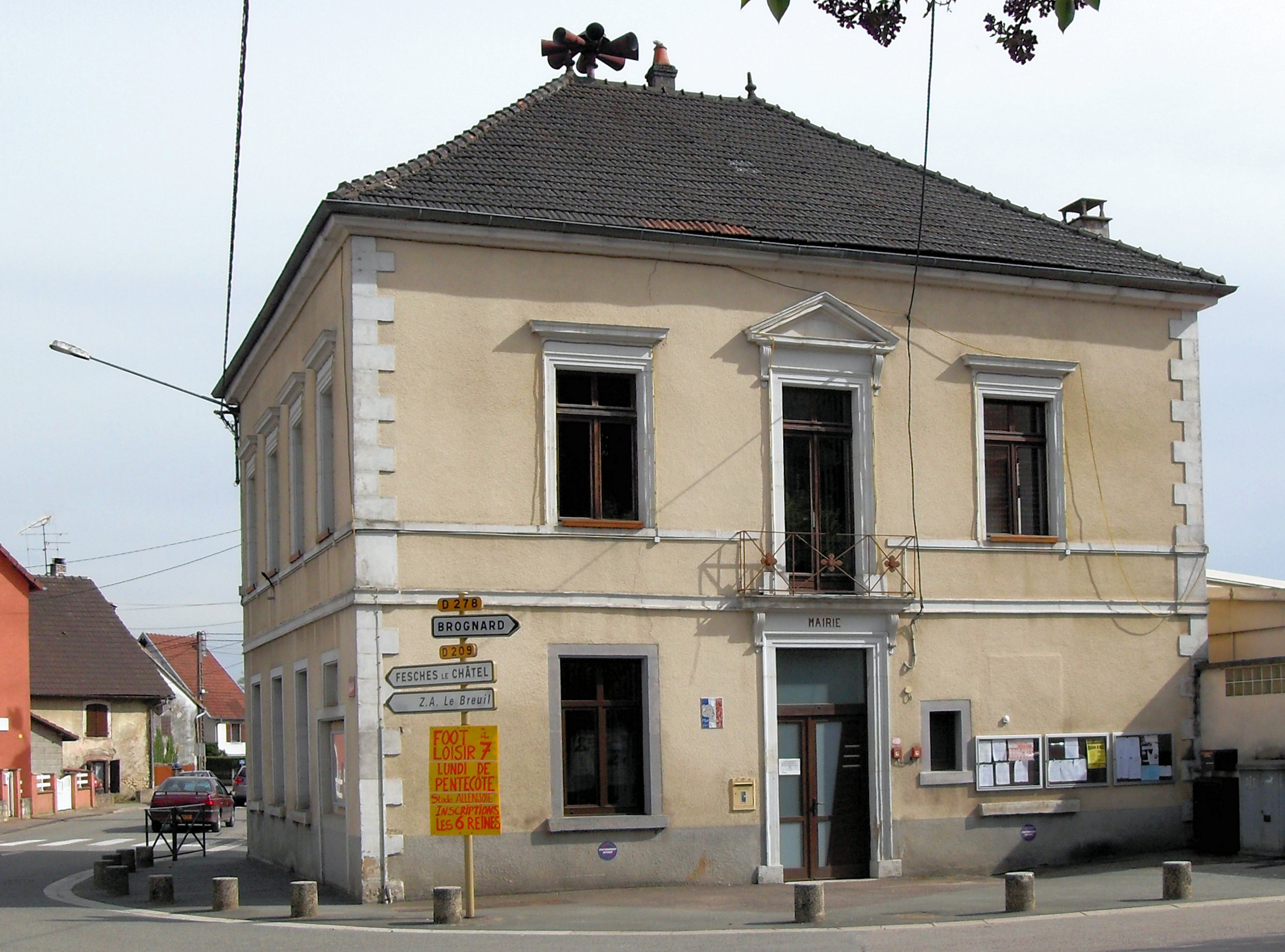 La mairie d'Allenjoie